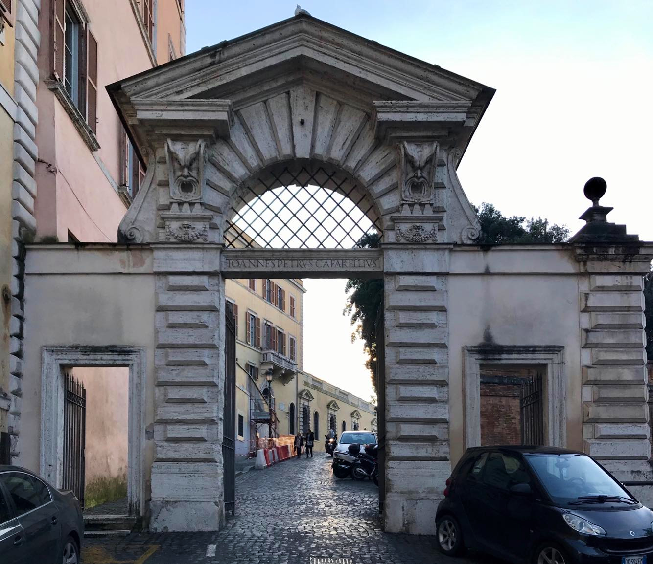 Portale di accesso alla scomparsa Villa Caffarelli sul Campidoglio a Roma